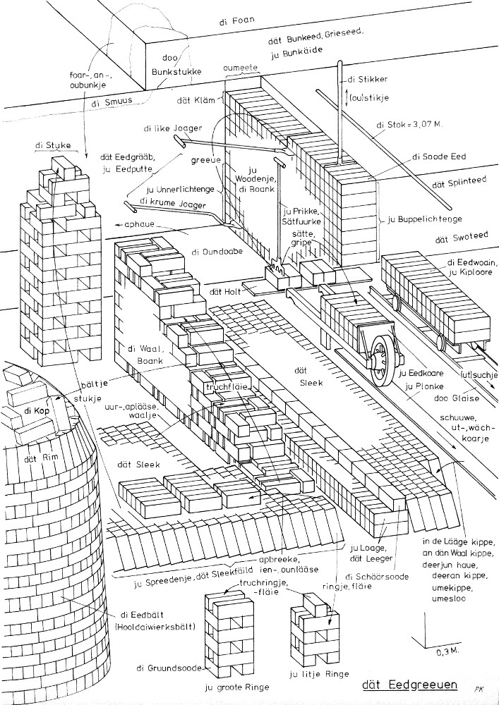 Peat digging in Saterfrisian. Own drawing.